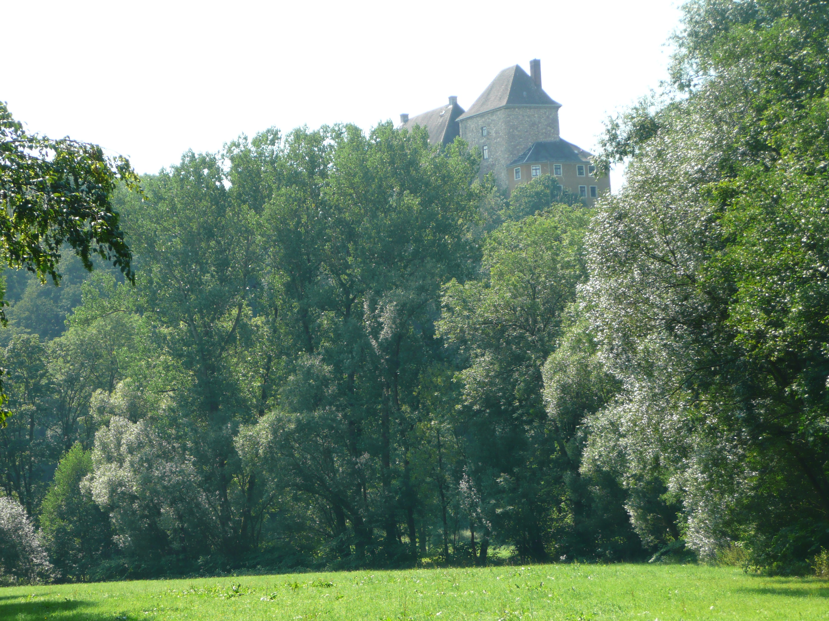 Ansicht des Schloß Bieberstein von der Kleinbahntrasse aus